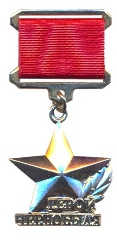 Медаль "Герой Чернобыля"